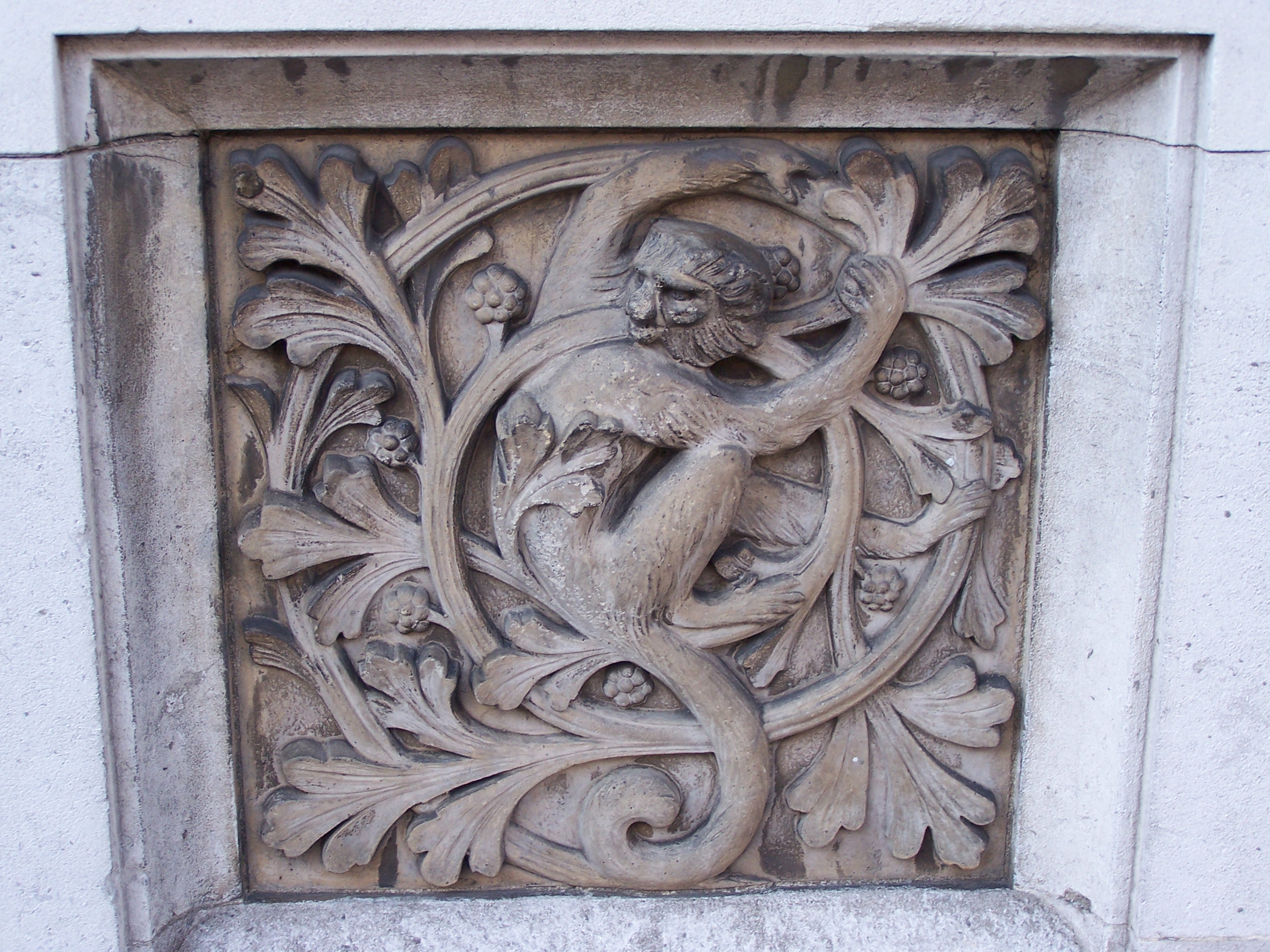 Détail des colonnes de l'entrée du Natural History Museum de Londres